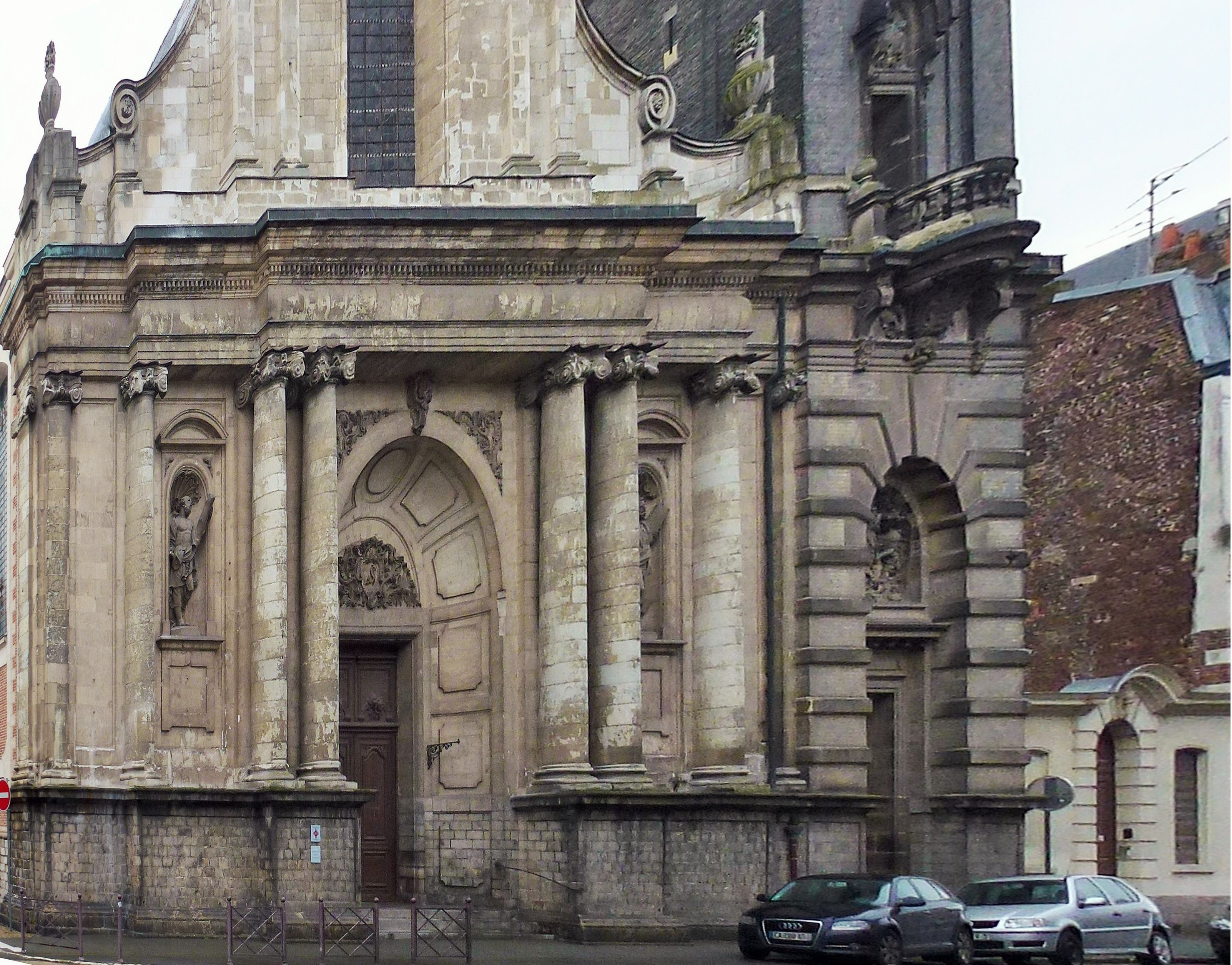 Église Saint-André de Lille Lille Nord (département français). .